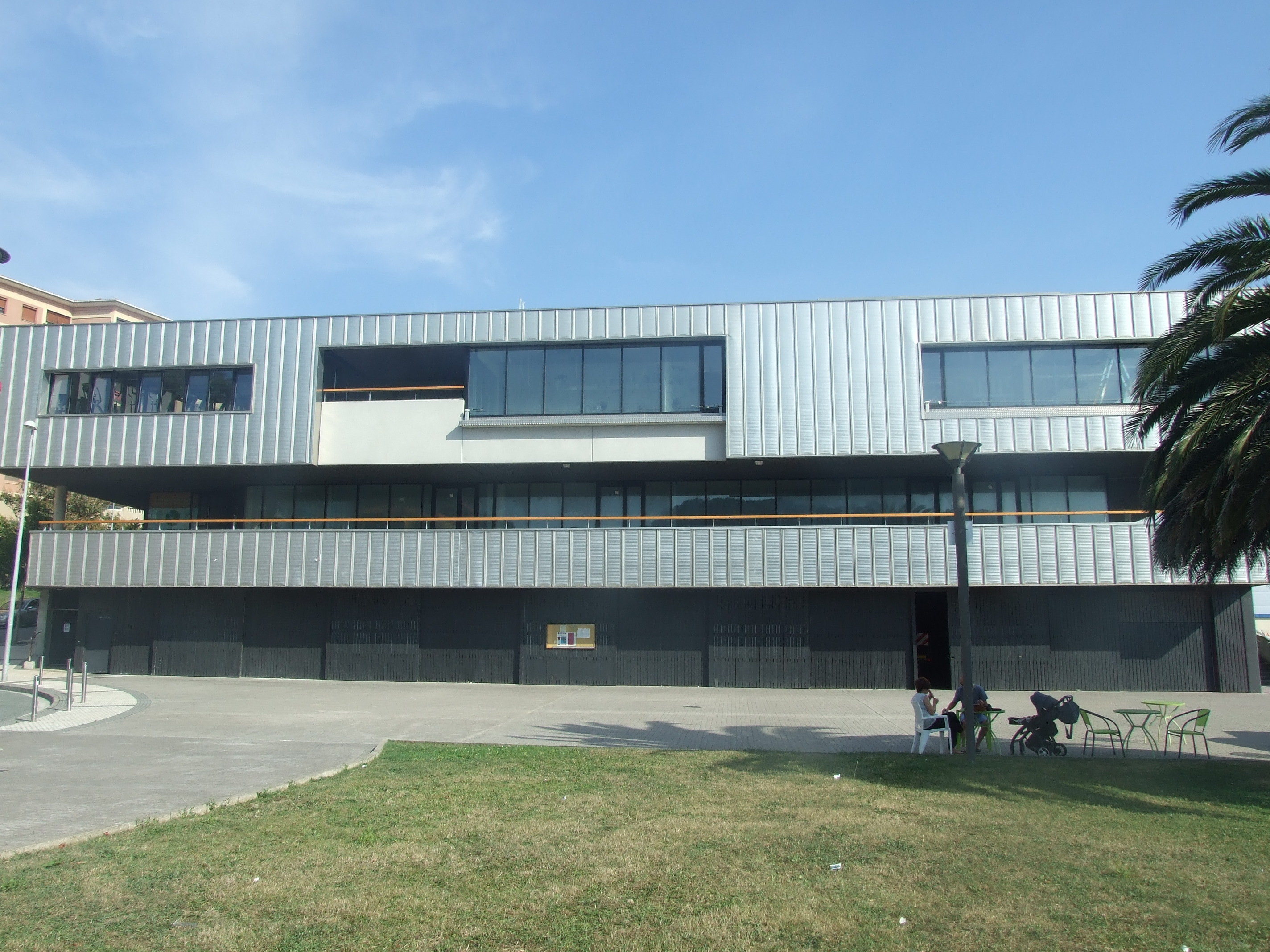 Instalaciones actuales del Koxtape Arraun Elkartea